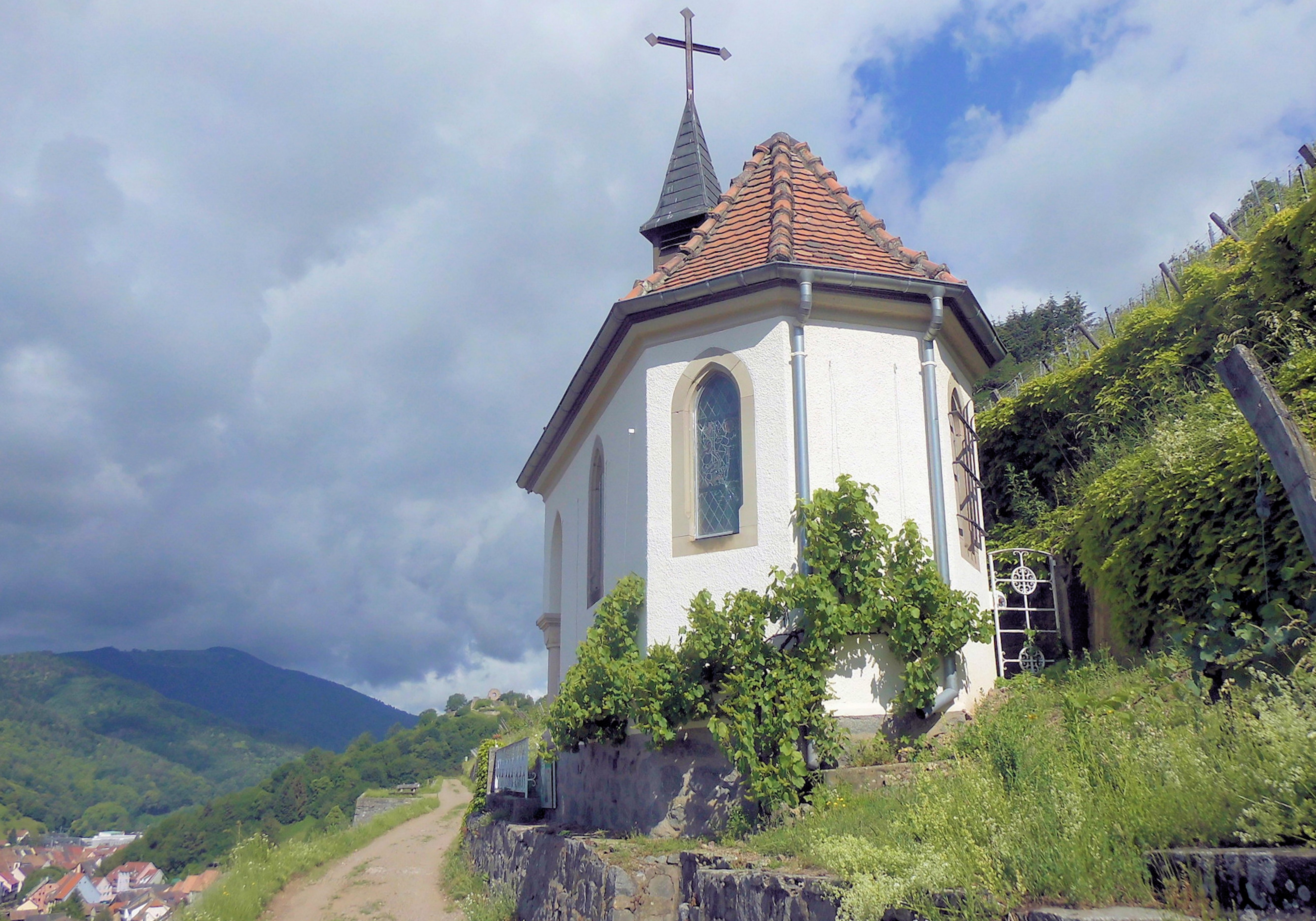 La chapelle Saint-Urbain à Thann